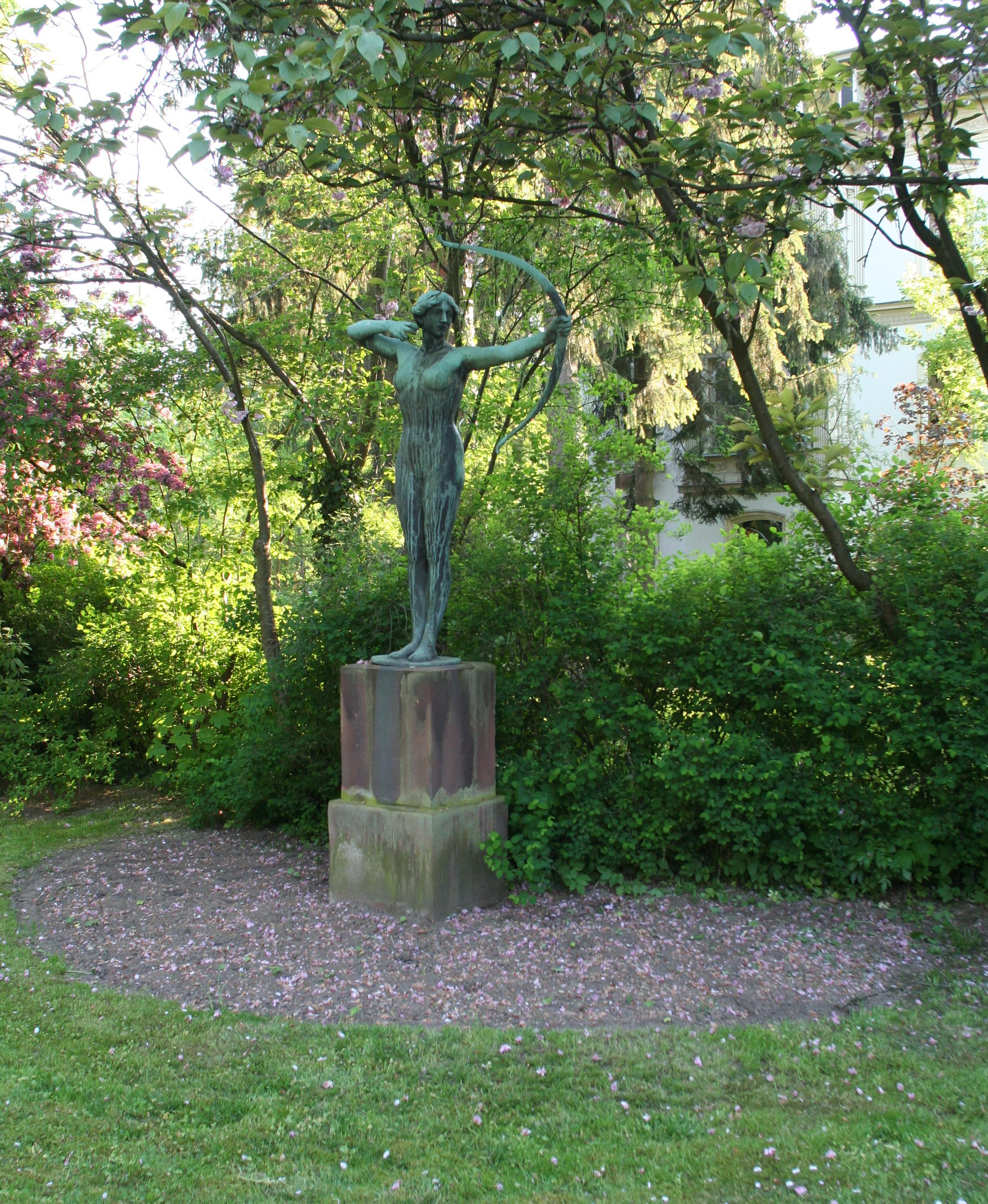 Bahnhofstraße in Coburg, Bogenspannerin von 1908 Ferdinand Lepcke